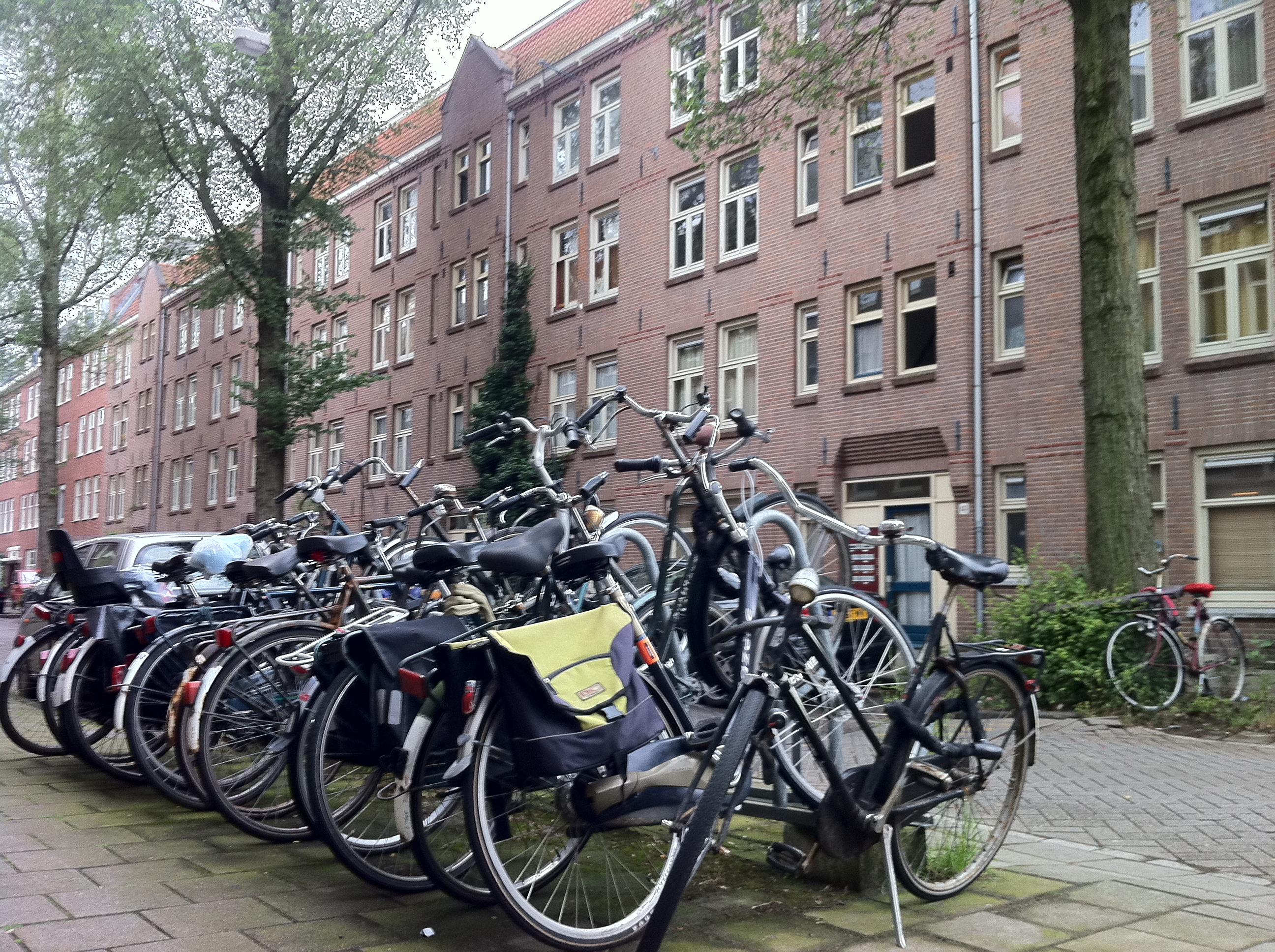 Rombout Hogerbeetsstraat 18-32, ontworpen in 1912-1914 door Hein Berlage. Bouw begonnen eind 1914, eerste oplevering oktober 1915. Door Wbv De Arbeiderswoning, nu verhuurd door Ymere